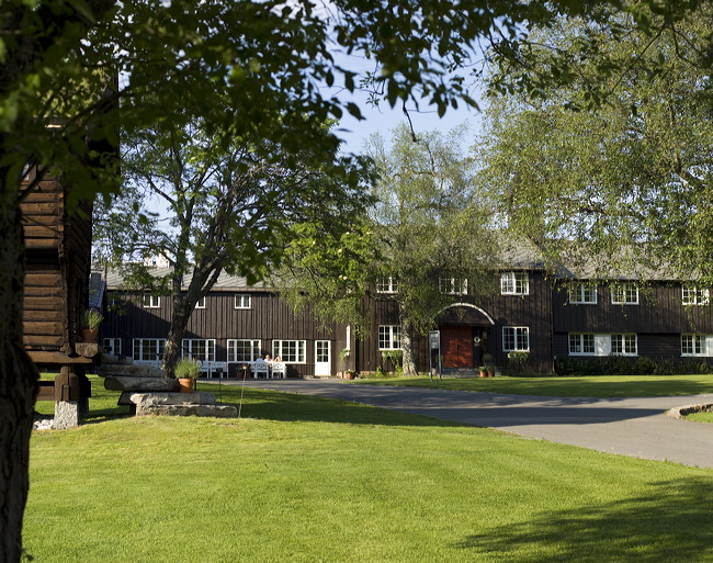 Lysebu sett fra tunet